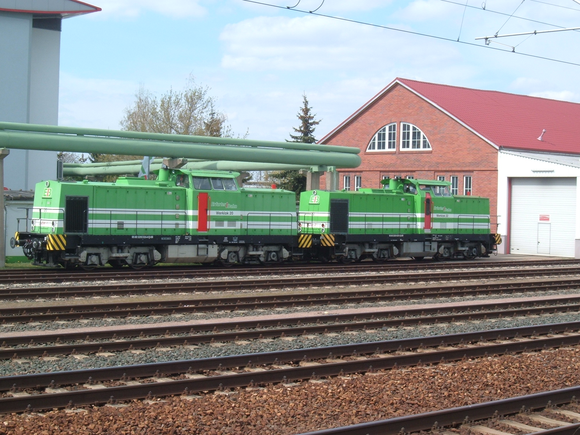 293 024 (Lisa 1) und 293 025 (Lisa 2) der Erfurter Bahn im Werk EF Ost.